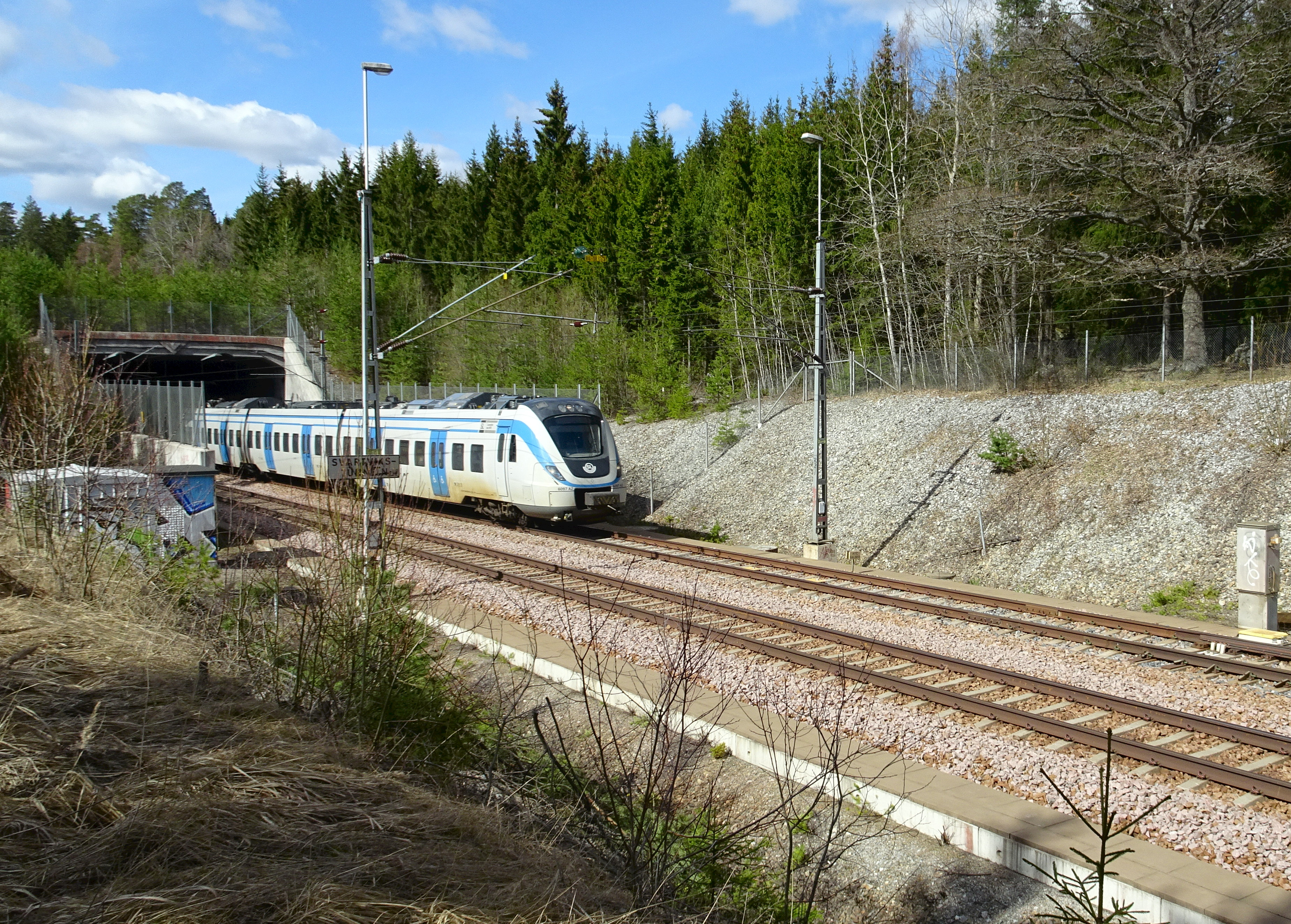 Pendeltåg på Mälarbanan lämnar Svartvikstunneln